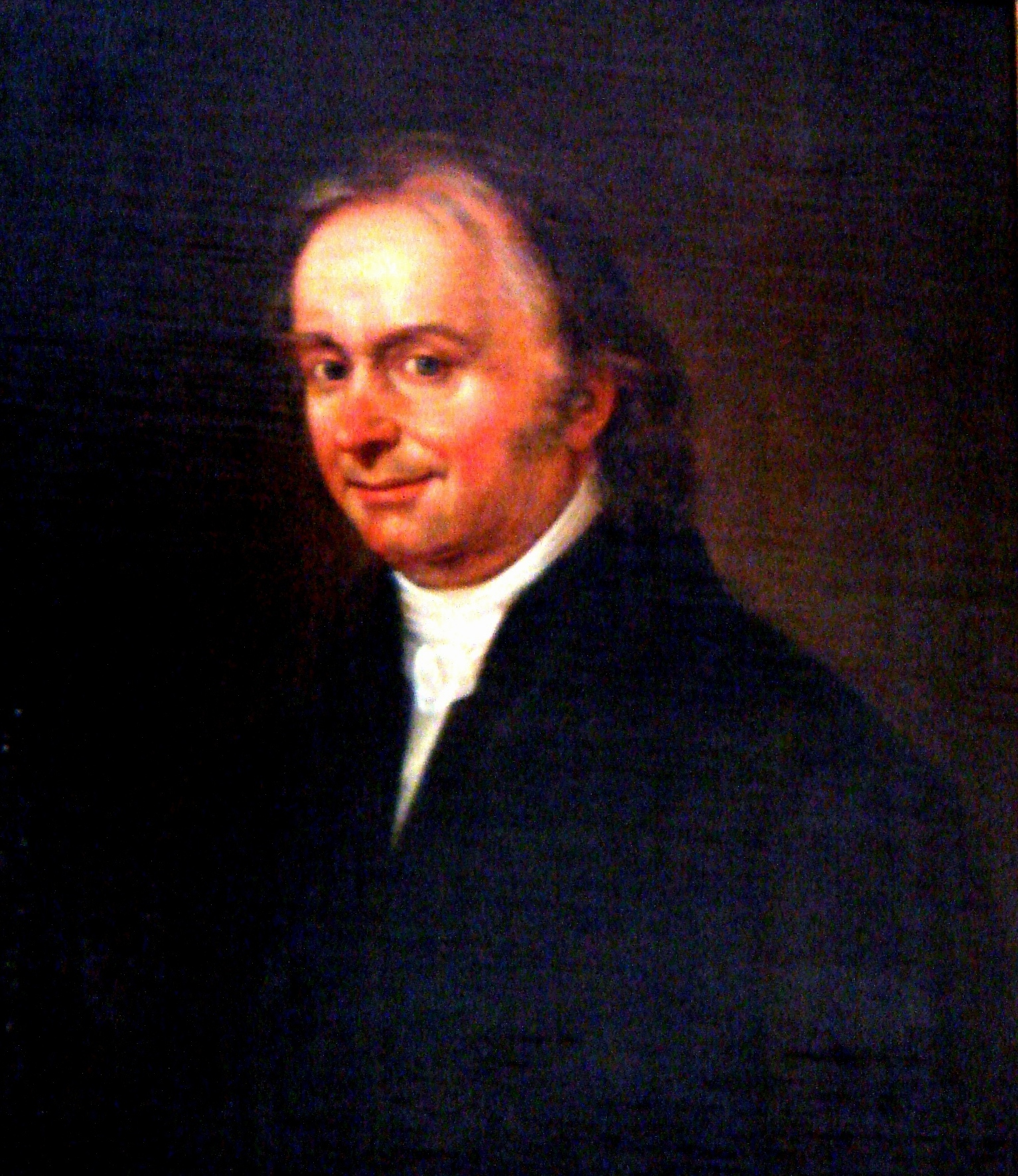 Jöns Svanberg 1771-1851. Professor vid Uppsala universitet.